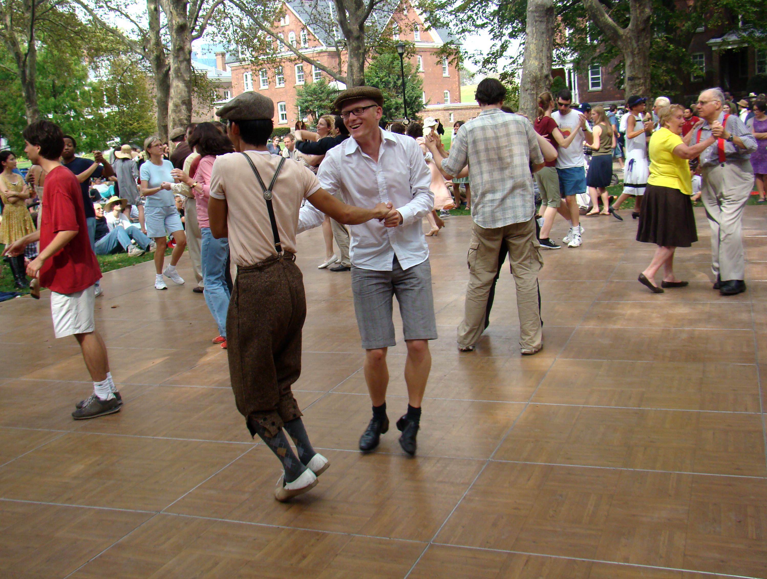 tappa tappa tappa